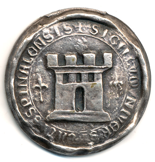 Médaille (40mm) représentant le sceau de la ville d'Epinal en 1444